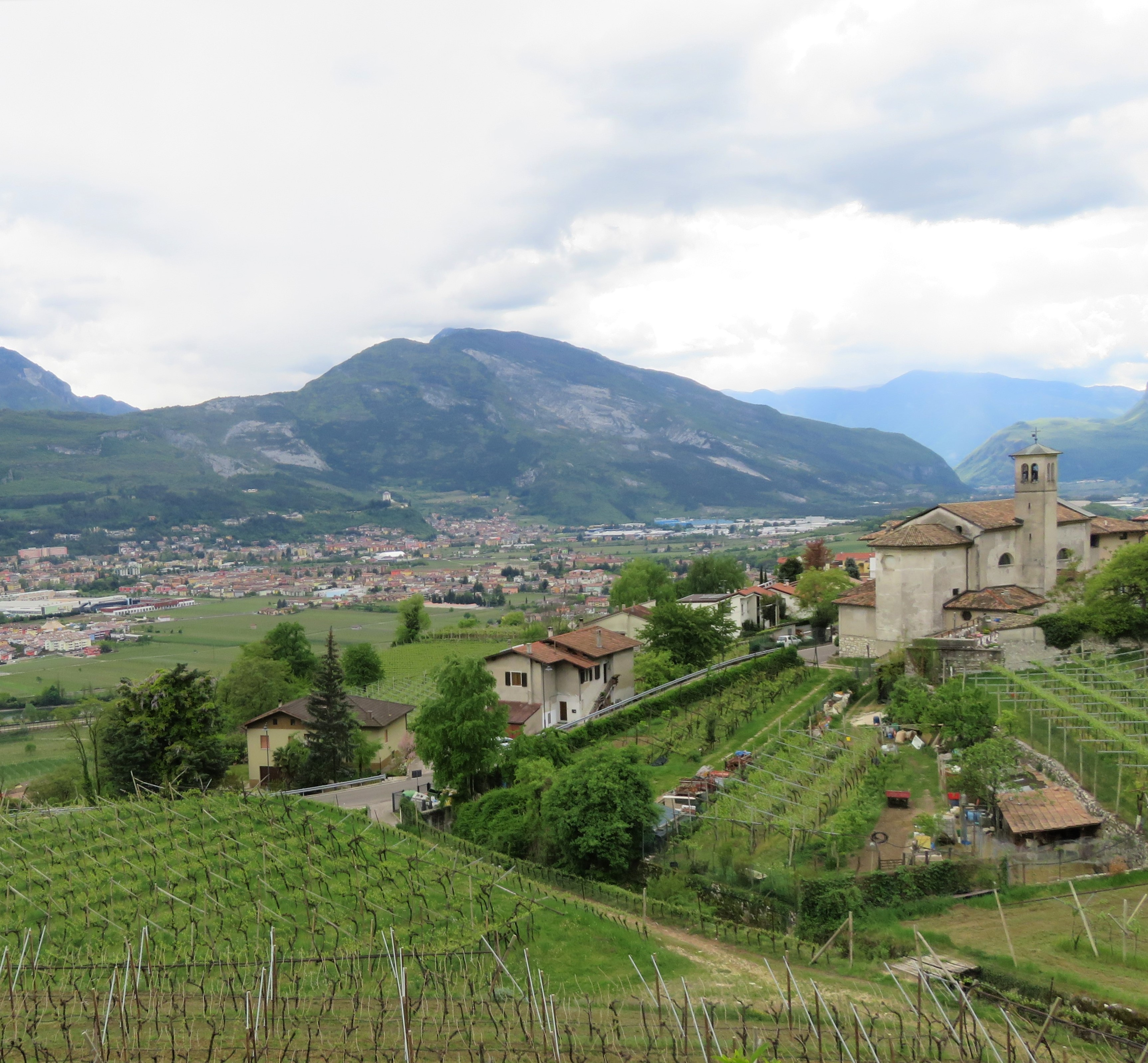 Chiesa di San Matteo Apostolo e frazione di Sasso di Nogaredo con panorama sulla Vallagarina